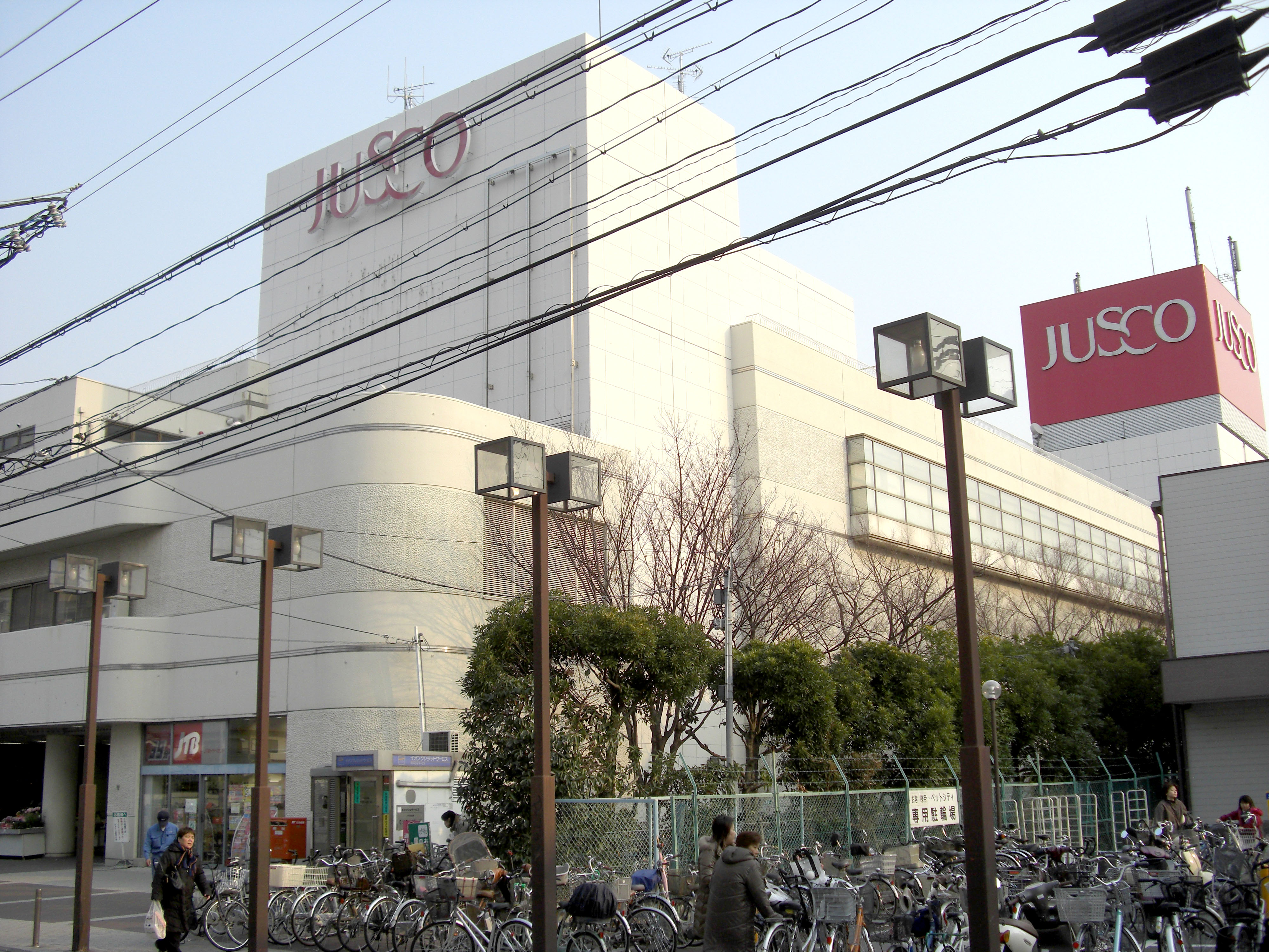 JUSCO Ibaraki,Nakatsu-cho Ibarakishi-shi Osaka Japan.